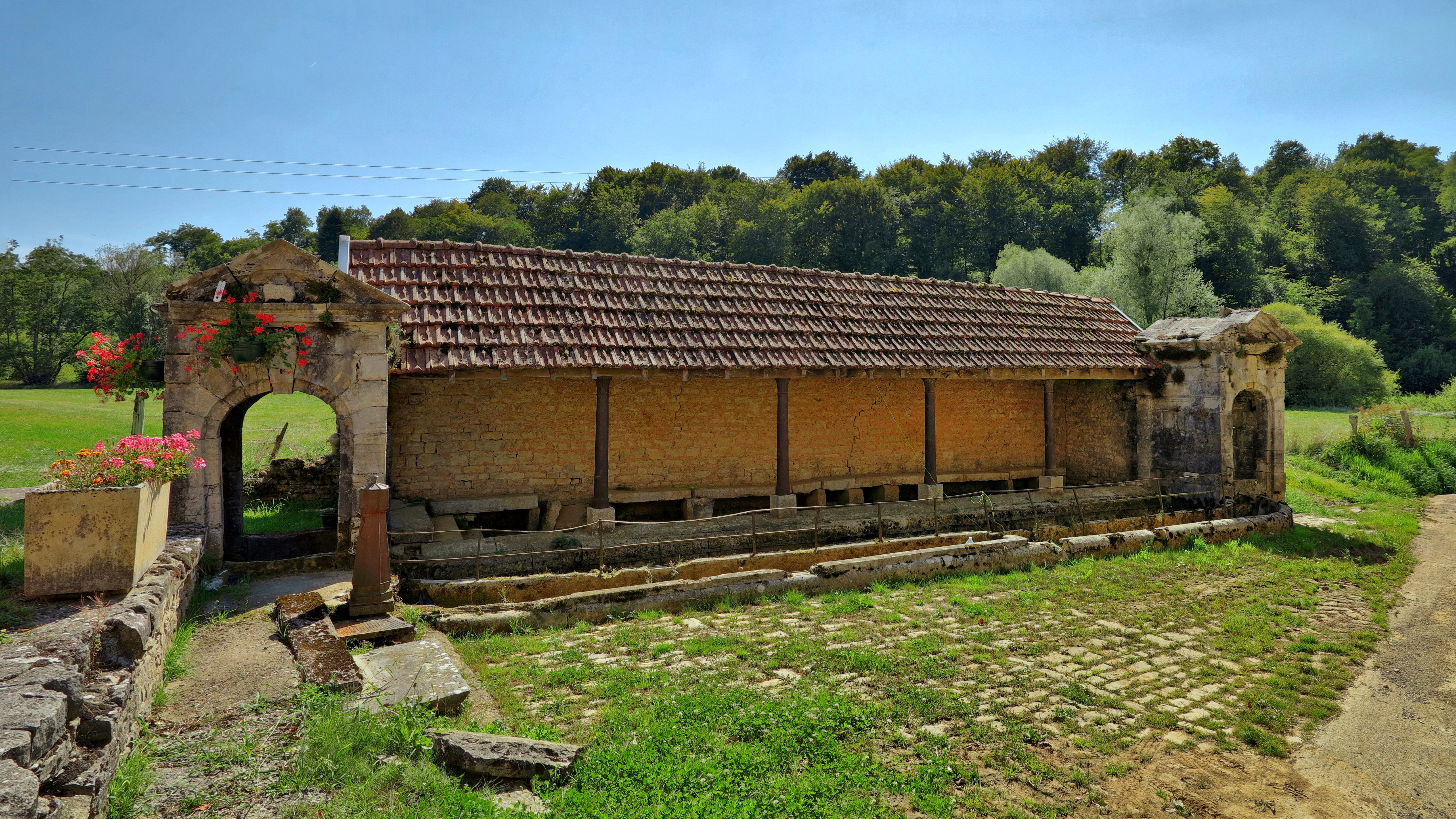 La fontaine-lavoir-abreuvoir